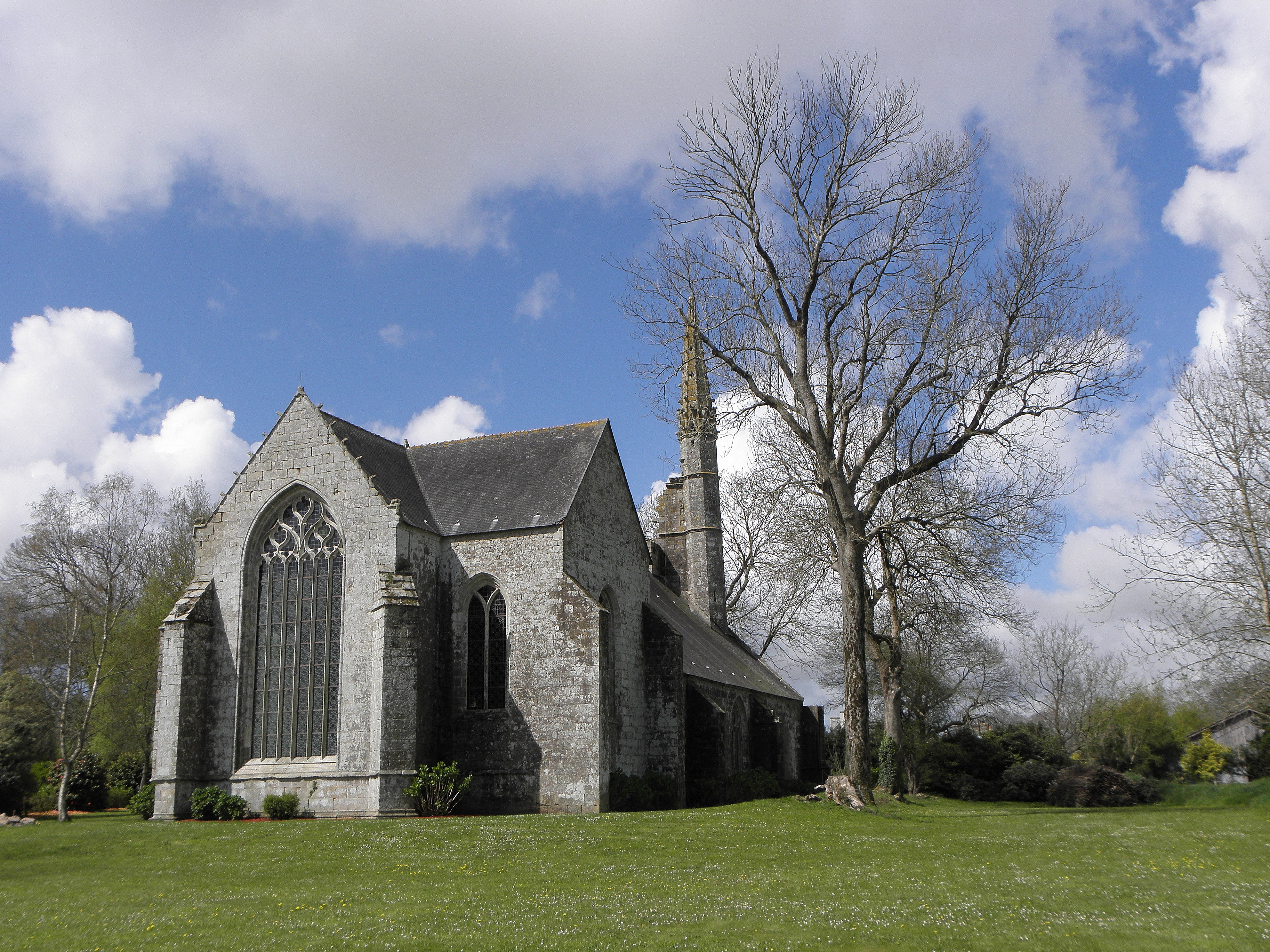 Chevet et flanc nord de la chapelle Saint-Germain en Plogastel-Saint-Germain (29).